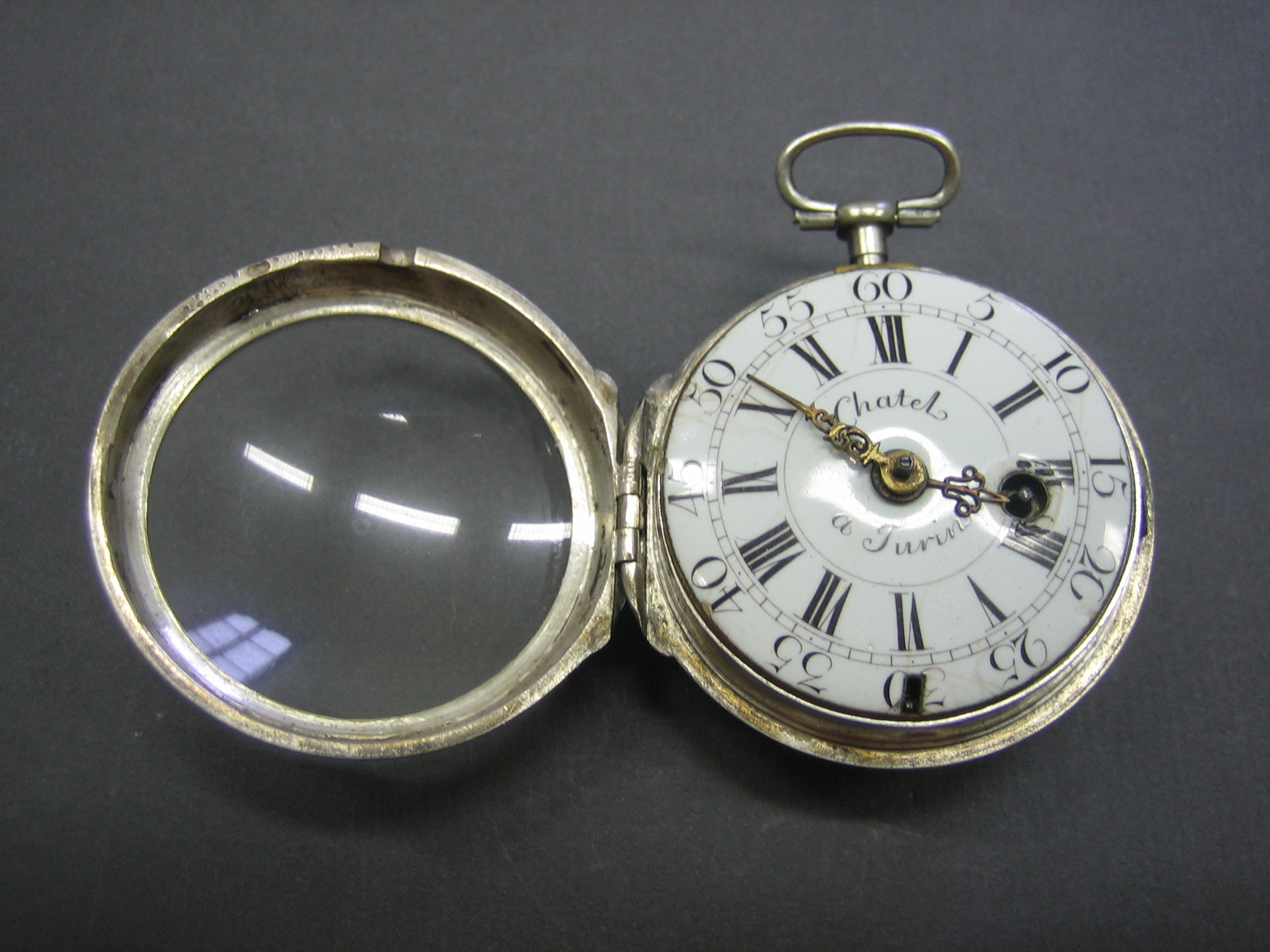 Cassa in due parti: fondo liscio e lunetta portavetro. Pendente a disco con supporto cilindrico e anello ovale Quadrante con indicazione delle ore in numeri romani e indicazione dei minuti in cifre arabe di cinque in cinque. Lancette traforate e incise Movimento a platina intera con colonnini a balaustro. Conoide a catena. Scappamento a verga. Ponte bilanciere traforato e inciso a due piedi con controperno in acciaio. Regolazione del tempo a chiavetta su quadrantino. Carica a chiavetta anteriore.